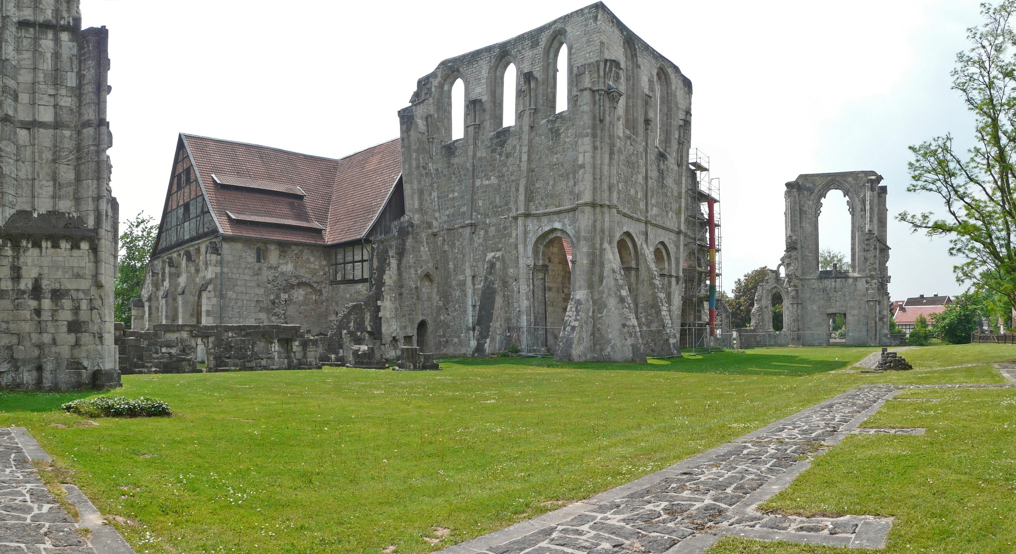 Ruine und Klausurgebäude des ehemaligen Zisterzienserklosters in Walkenried (Landkreis Osterode am Harz), Blick Richtung Südwesten, aufgenommen im Frühjahr 2011.